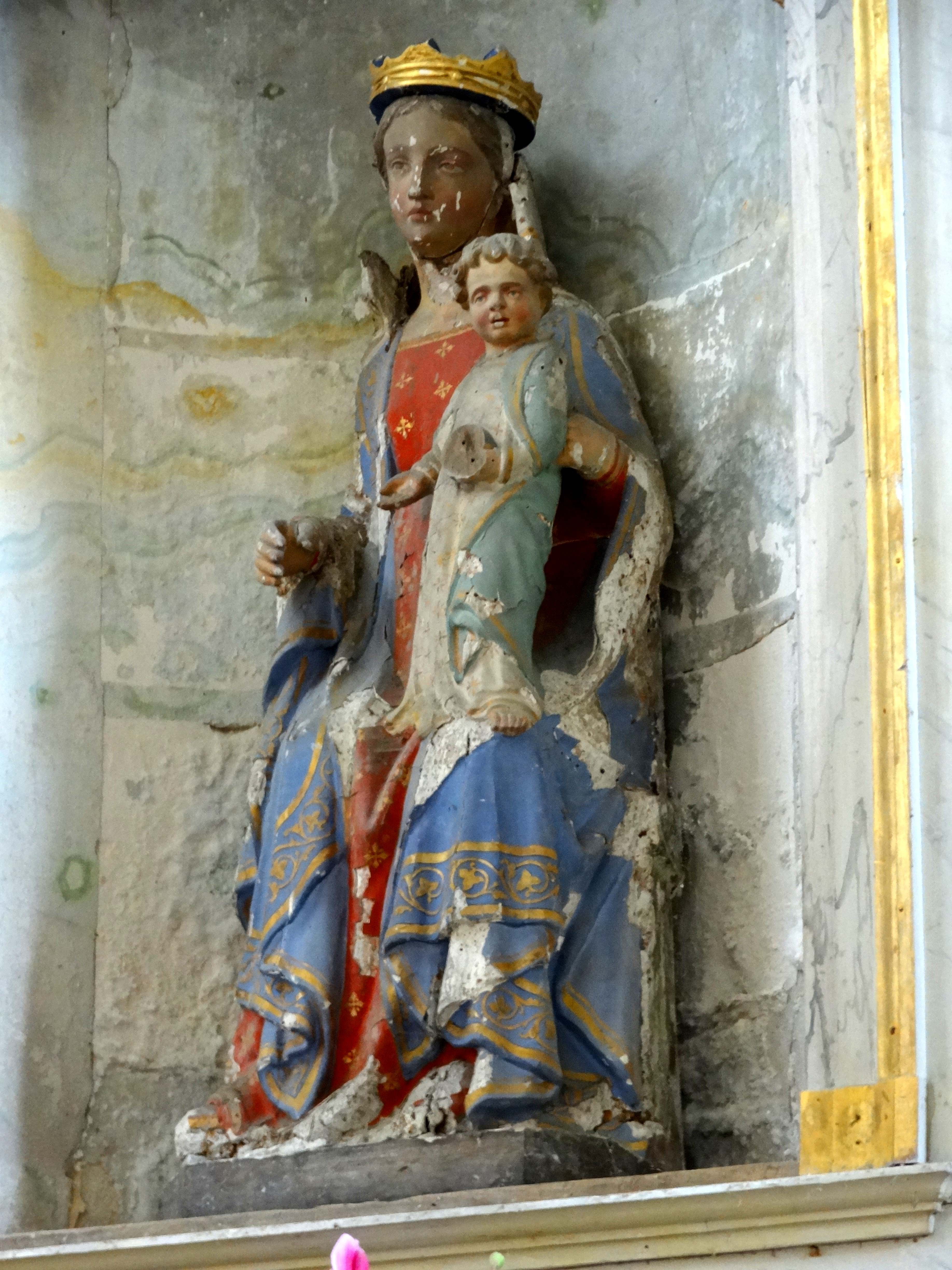 Mobilier de l'église - voir titre.